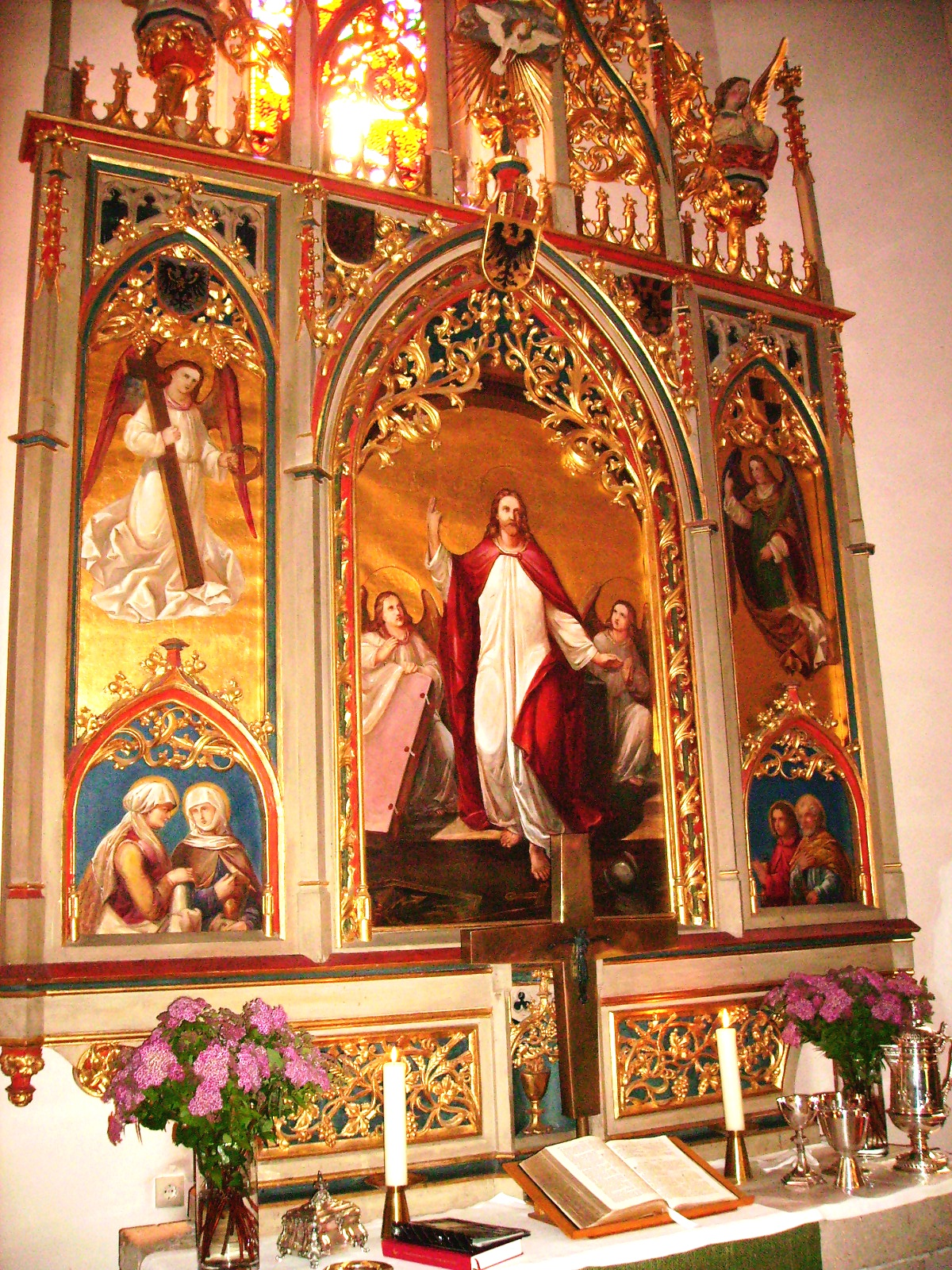 Altar der Pfarrkirche St. Johannes (Hechingen), Germany